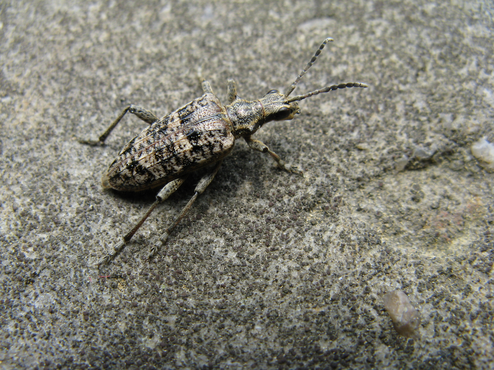 kousavec korový Rhagium inquisitor (Linnaeus, 1758) det. F. Vitali nález:lokalita Mírov (Zábřežská vrchovina)